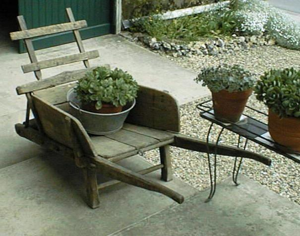 Cliché personnel Brouette ancien en bois (frêne). Les flance de la caisse sont ammovibles, ainsi que la réhausse à l'avant. Roue à jante en bois avec cerclage métallique (non visible malheureusement).